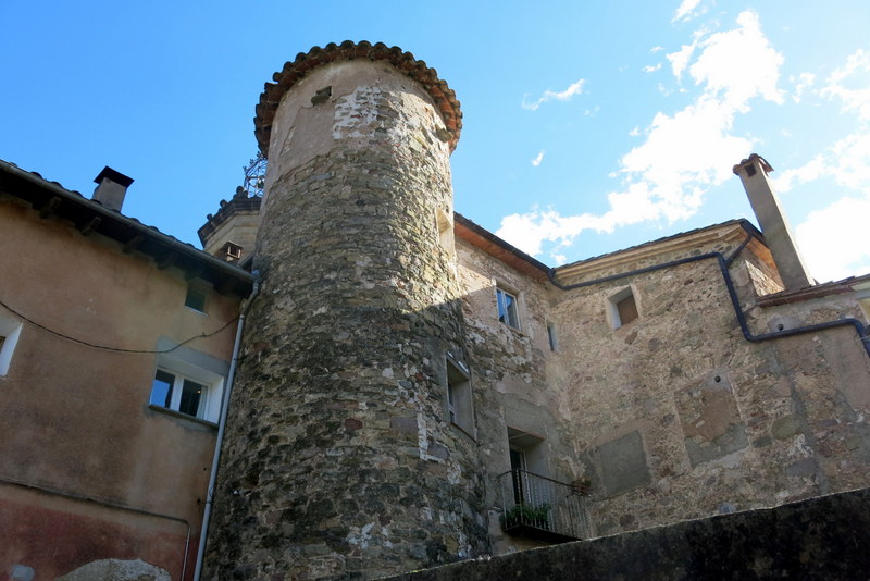 Torre de Ridaura a la Garrotxa - Catalunya